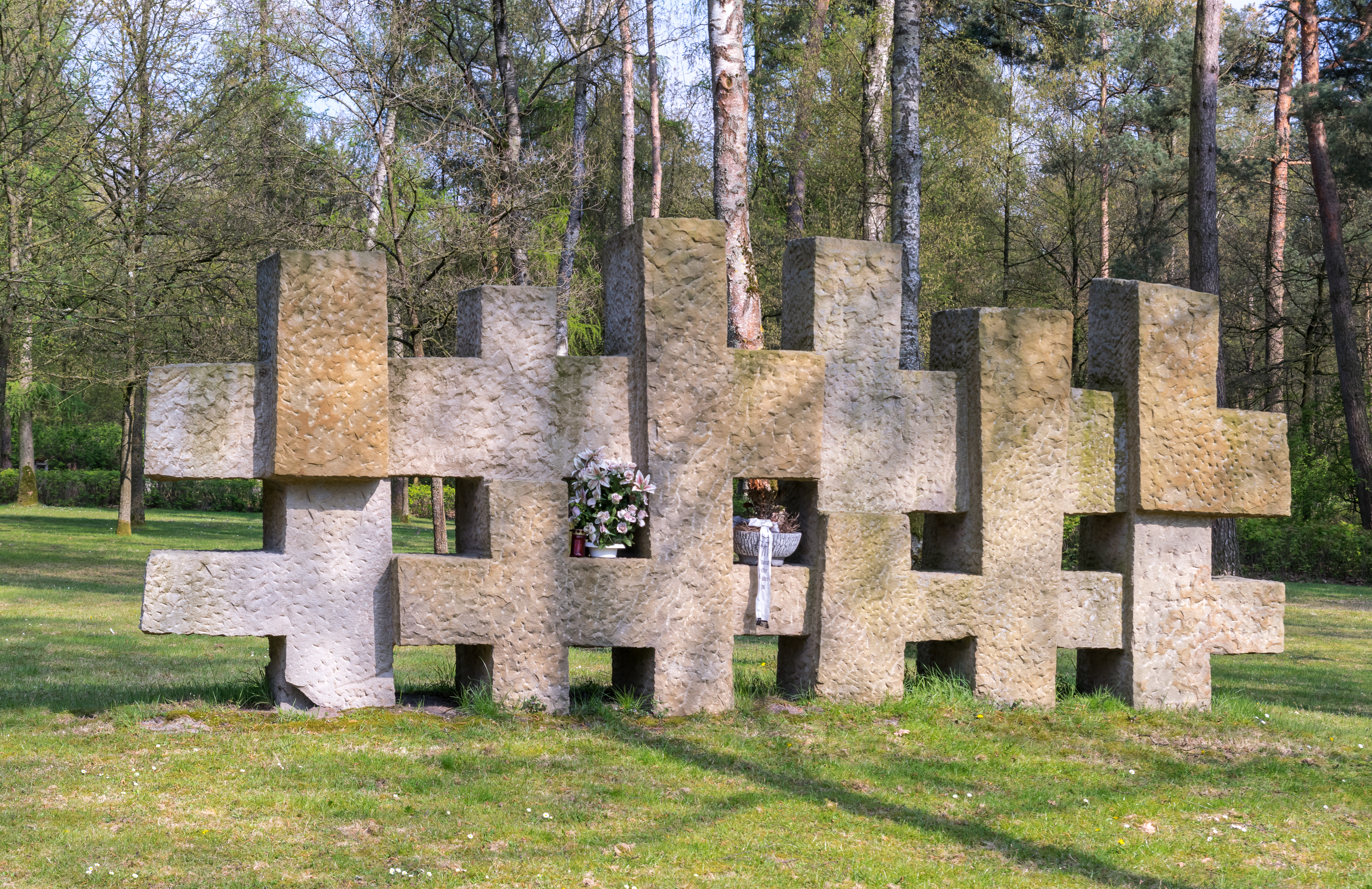 Mahnmal von Josef Rikus auf dem Ehrenfriedhof Stukenbrock-Senne für sowjetische Kriegsgefangene